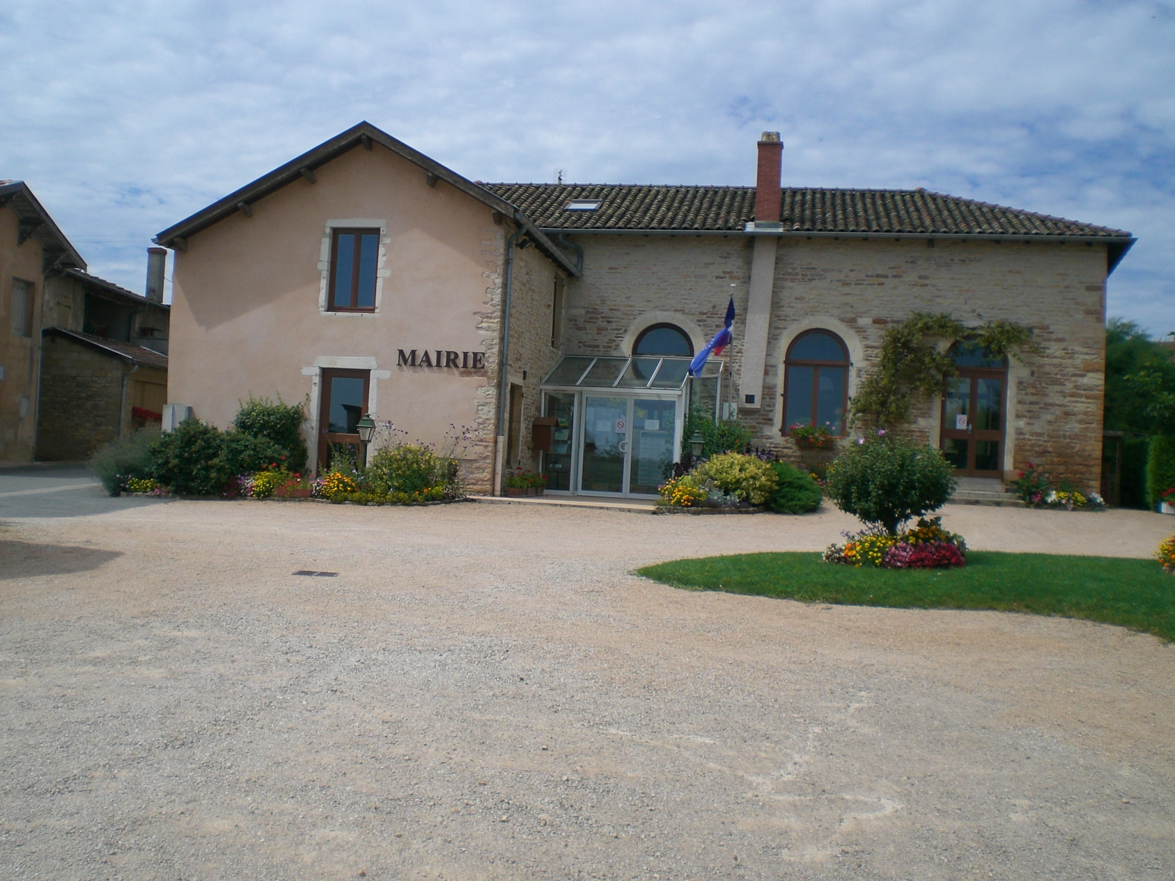 Description Mairie de Laizé Date2006SourceSelf-photographedAuthorRomuald Vieux Mairie de Laizé